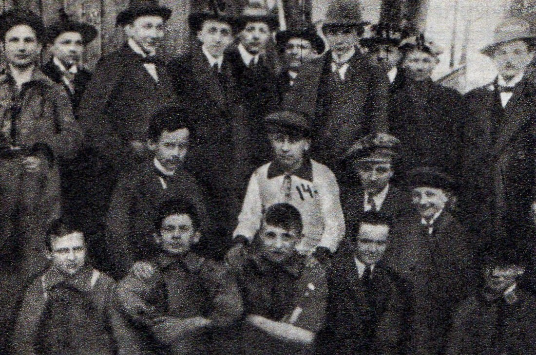 Bojówka skautowa (niepodległościowa) Sęp, działająca w Poznaniu w 1914r.